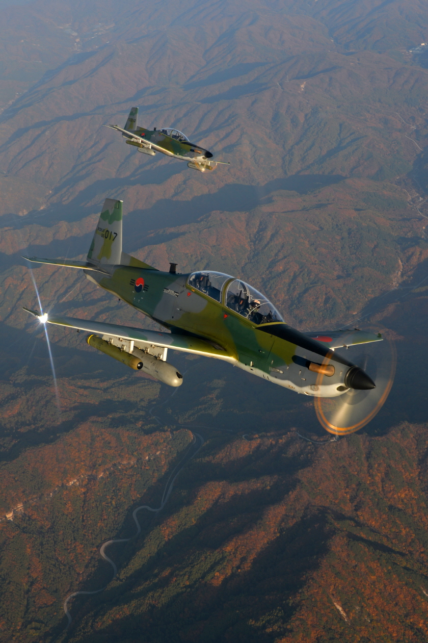 공군 제8전투비행단의 KA-1 전술통제기 편대가 10월 24일(금), 쾌청한 강원도 가을하늘을 누비며 비행임무를 수행하고 있다. 그 밑으로 울긋불긋한 단풍들이 완연한 가을이 왔음을 뽐내고 있다. KA-1 전술통제기는 국산 기본훈련기 KT-1에 로켓탄과 기관총으로 무장한 경공격기다. KT-1의 페루 수출형인 KT-1P의 초도 납품식이 최근 페루 라스팔마스 공군기지에서 거행되기도 했다.